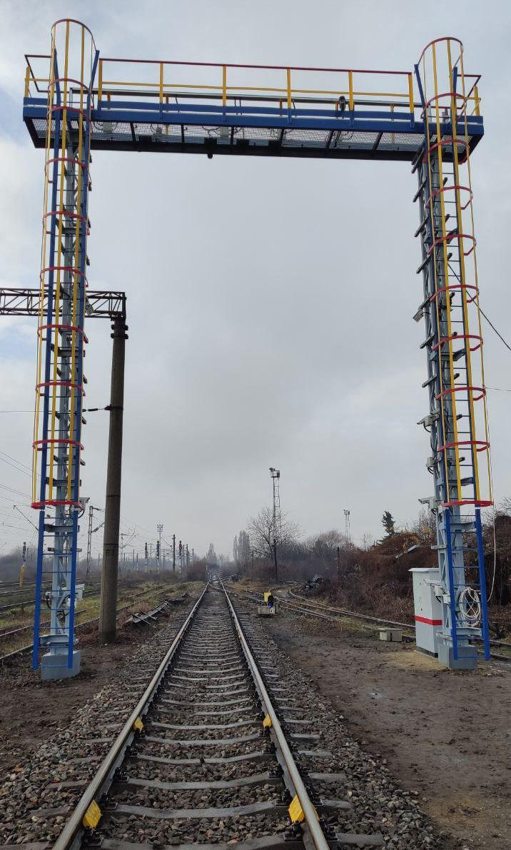 АСКОПВ 3.0